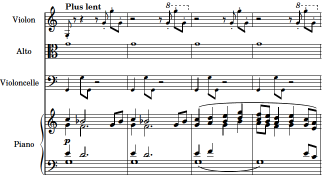 Exemple 1 créé avec Lilypond